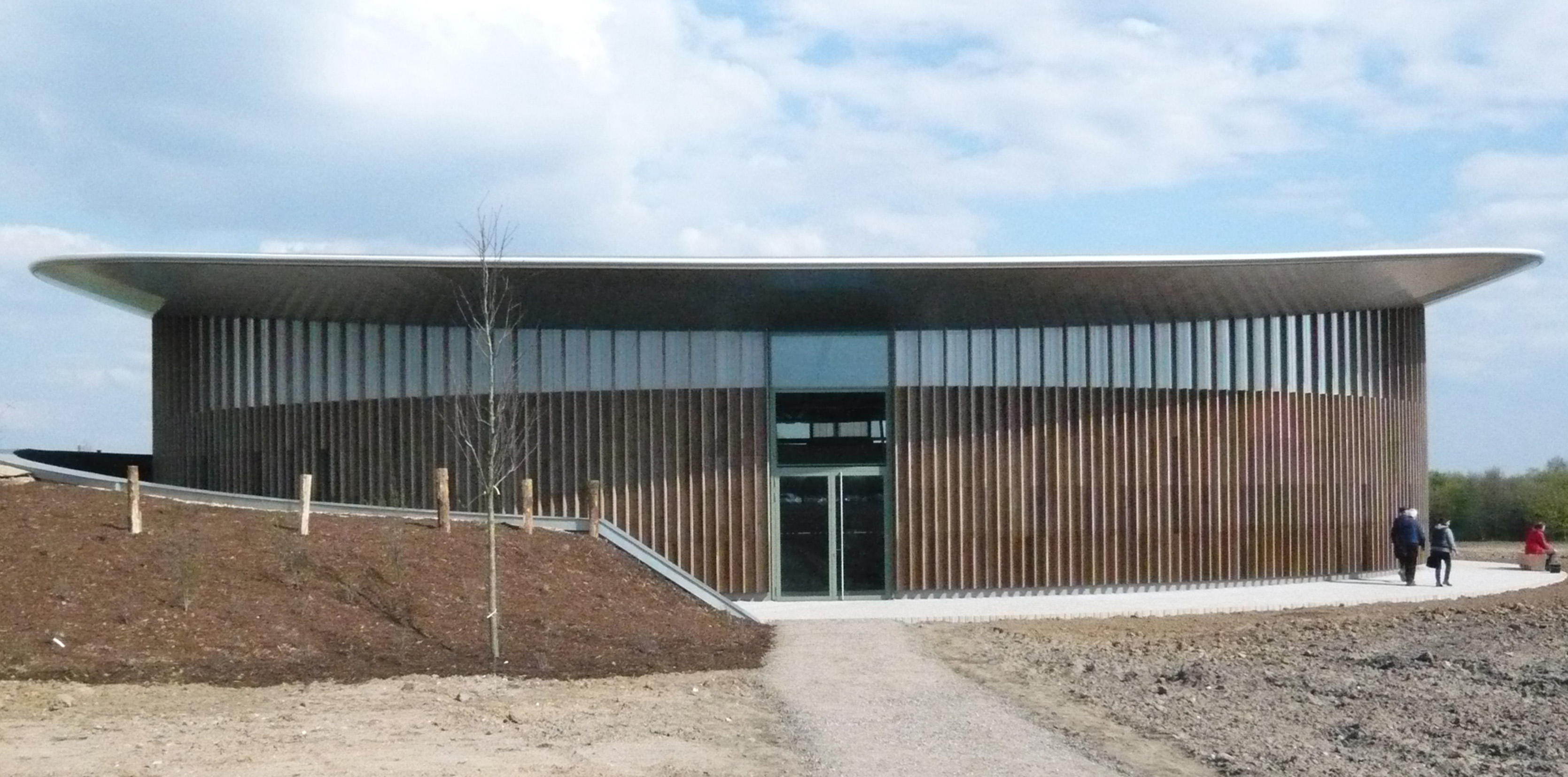 Skulpturenhalle in Neuss - Thomas Schütte Stiftung. Nach einem Modell von Thomas Schütte; liegt zwischen dem Gelände des Museums Insel Hombroich, dem Kirkeby-Feld, der ehemaligen Raketenstation und der Langen Foundation.